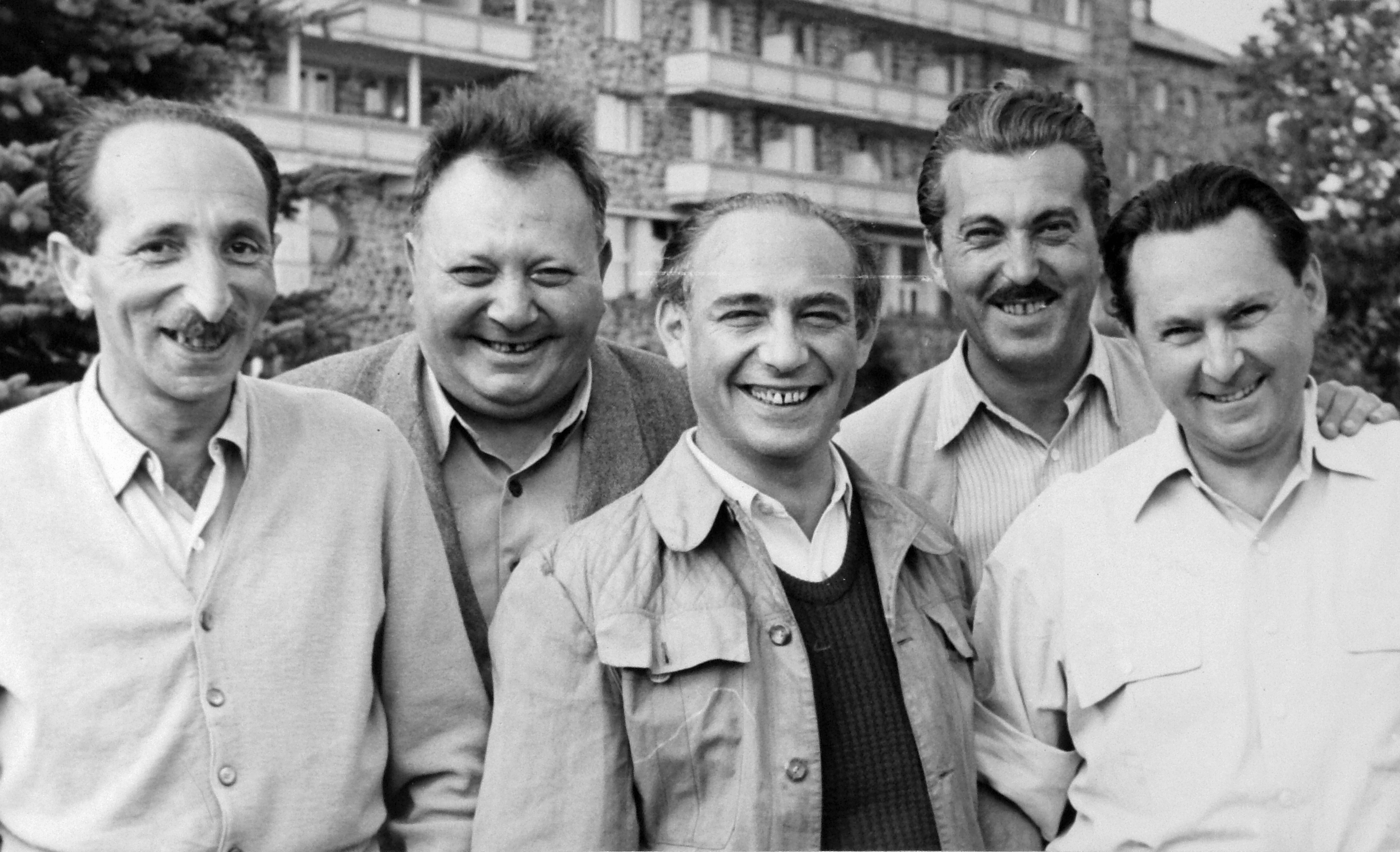 Gádoros Lajos (középen) és társasága a Nagyszálló előtt. Location: Hungary, Galyatető Title: Gádoros Lajos (középen) és társasága a Nagyszálló előtt.